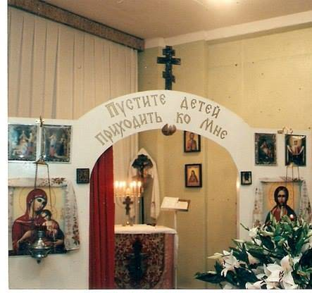 Первый алтарь устроенный в центре "Вера, Надежда, Любовь" в Обнинске